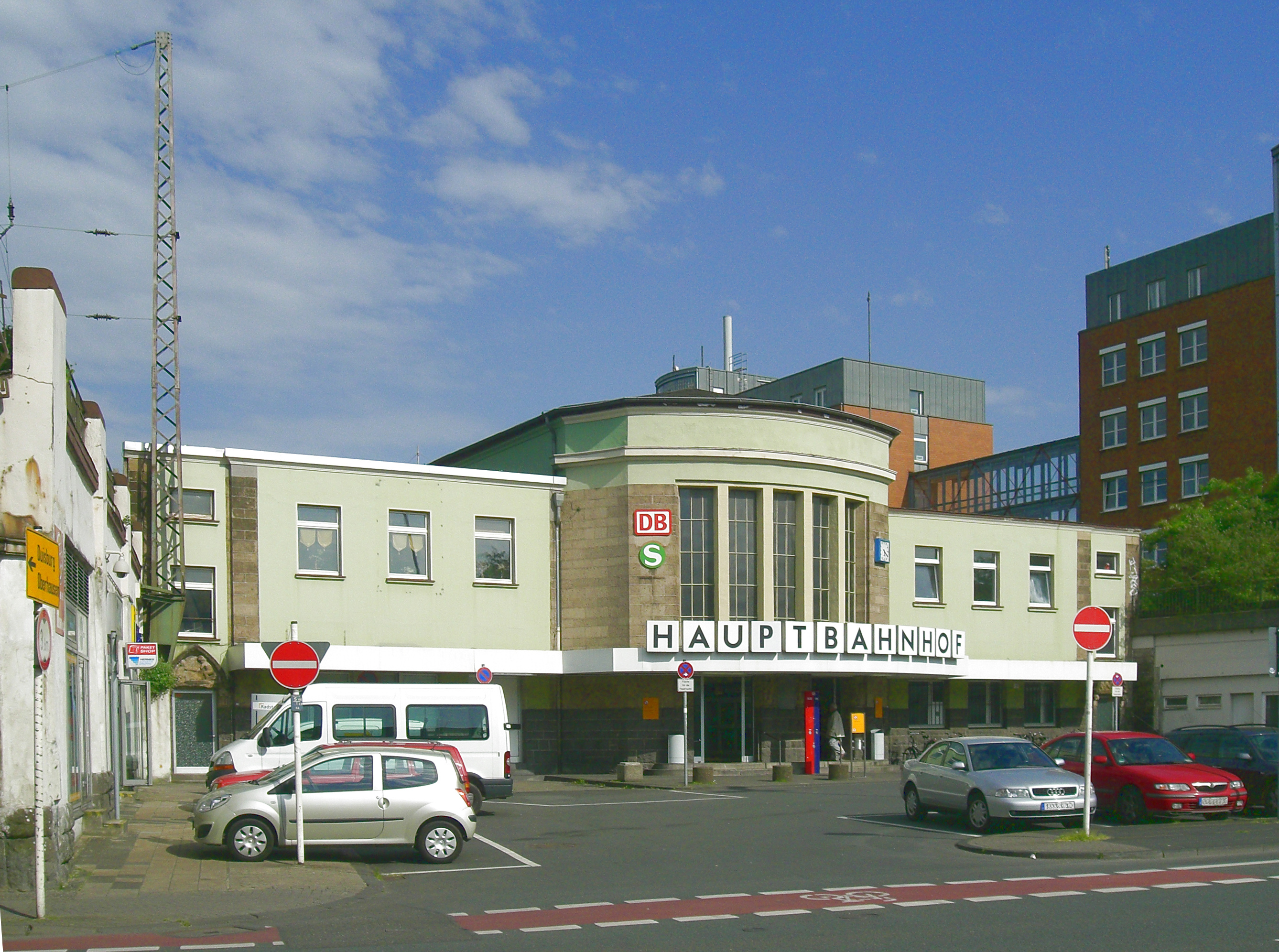 Mülheim an der Ruhr Hauptbahnhof